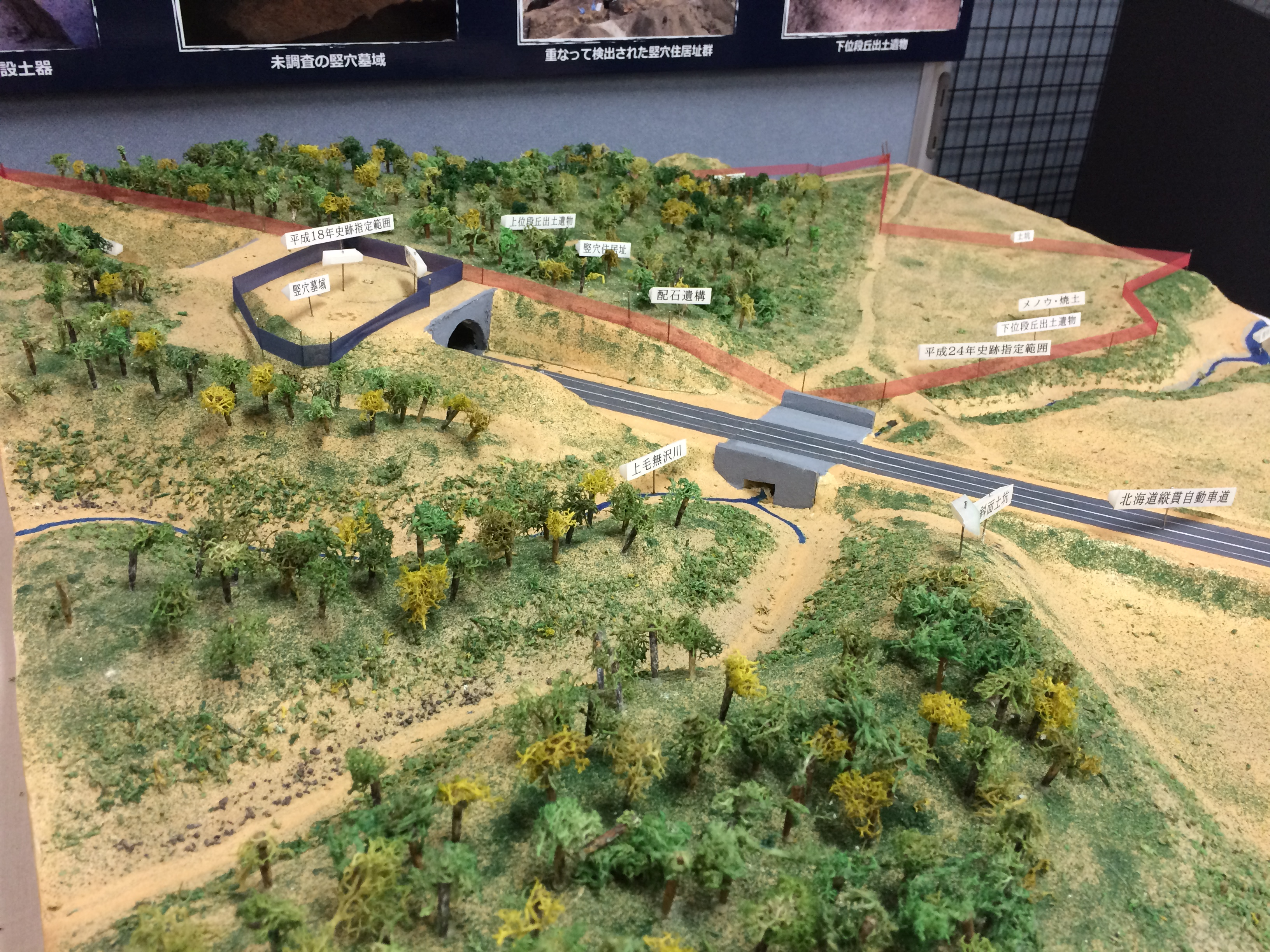 遺跡発掘事務所内にある鷲ノ木遺跡模型